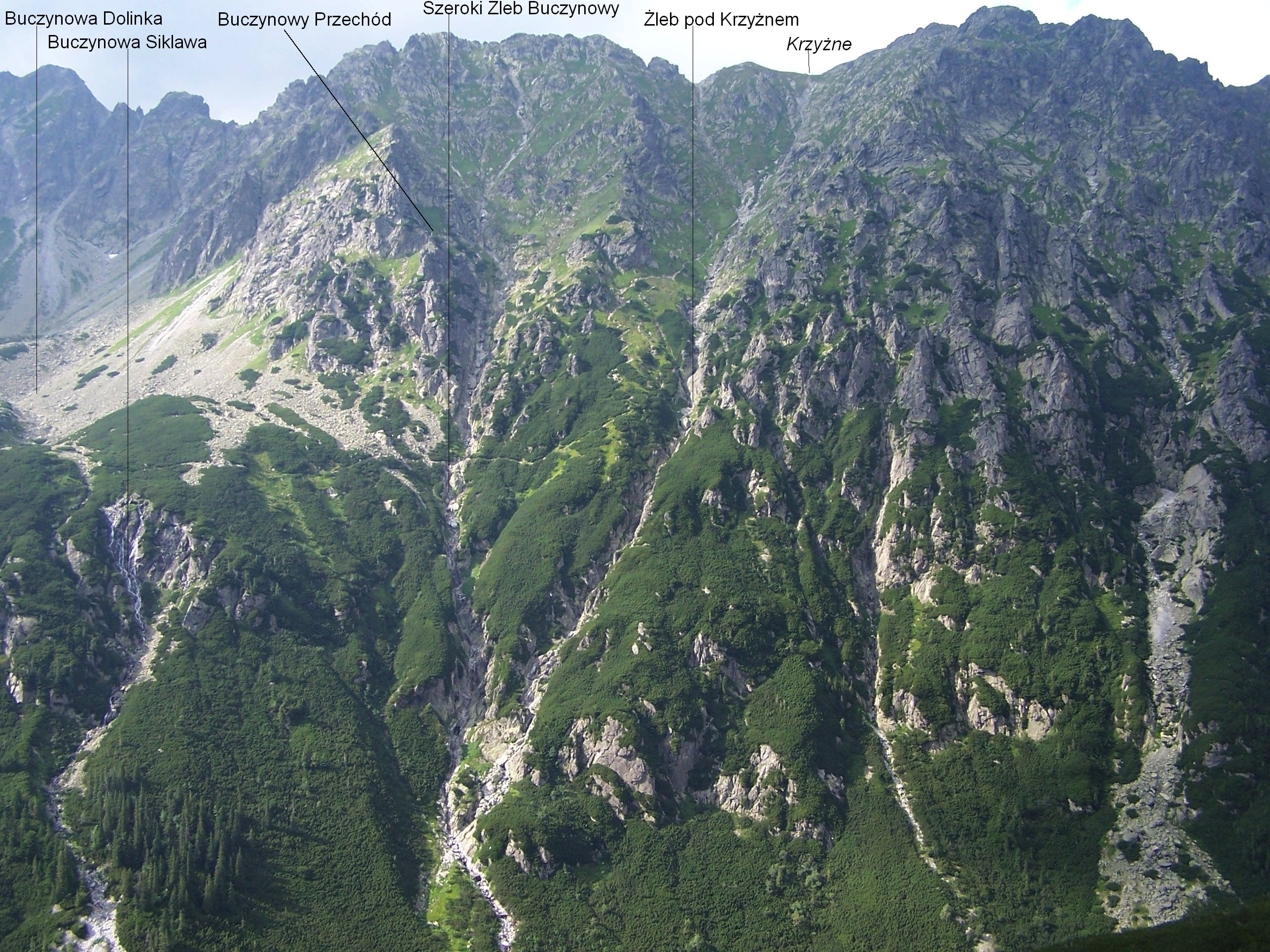 Widok z Świstowej Czuby